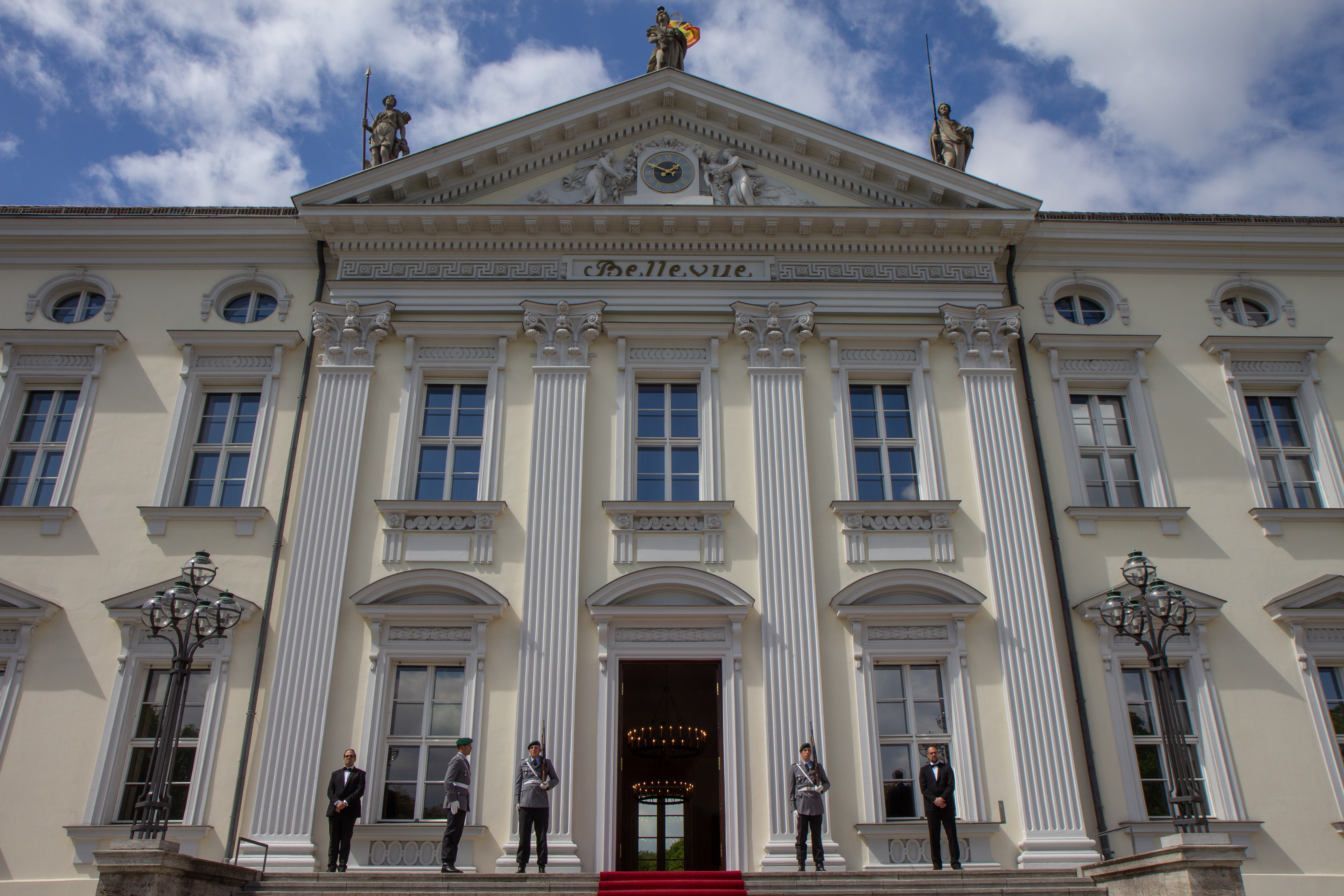 Schloss Bellevue am 6. Mai 2019.